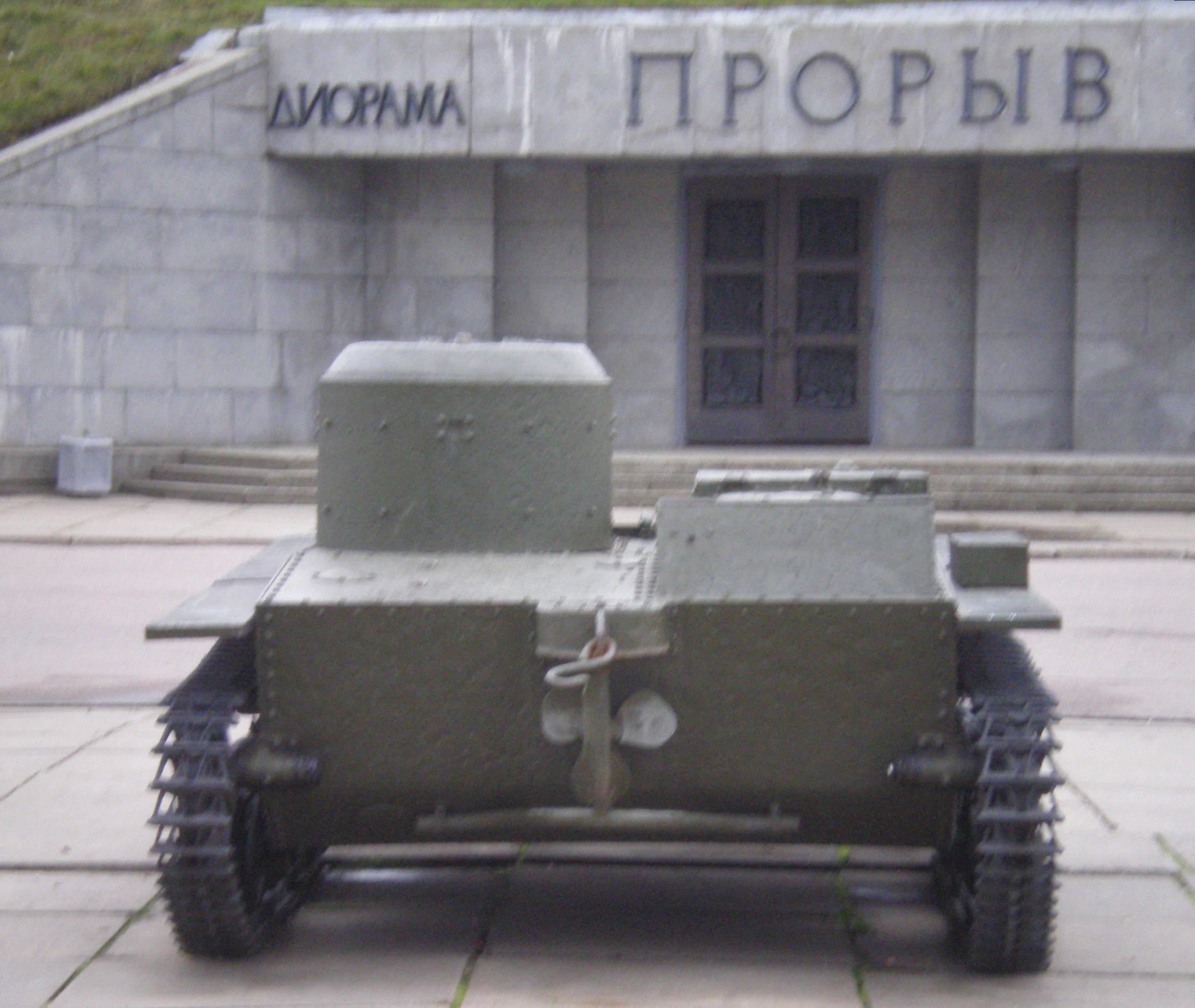 Танк Т-38. Вид сзади. Диорама «Прорыв блокады Ленинграда». Экспозиция военной техники периода 1941–1944 годов под открытым небом.